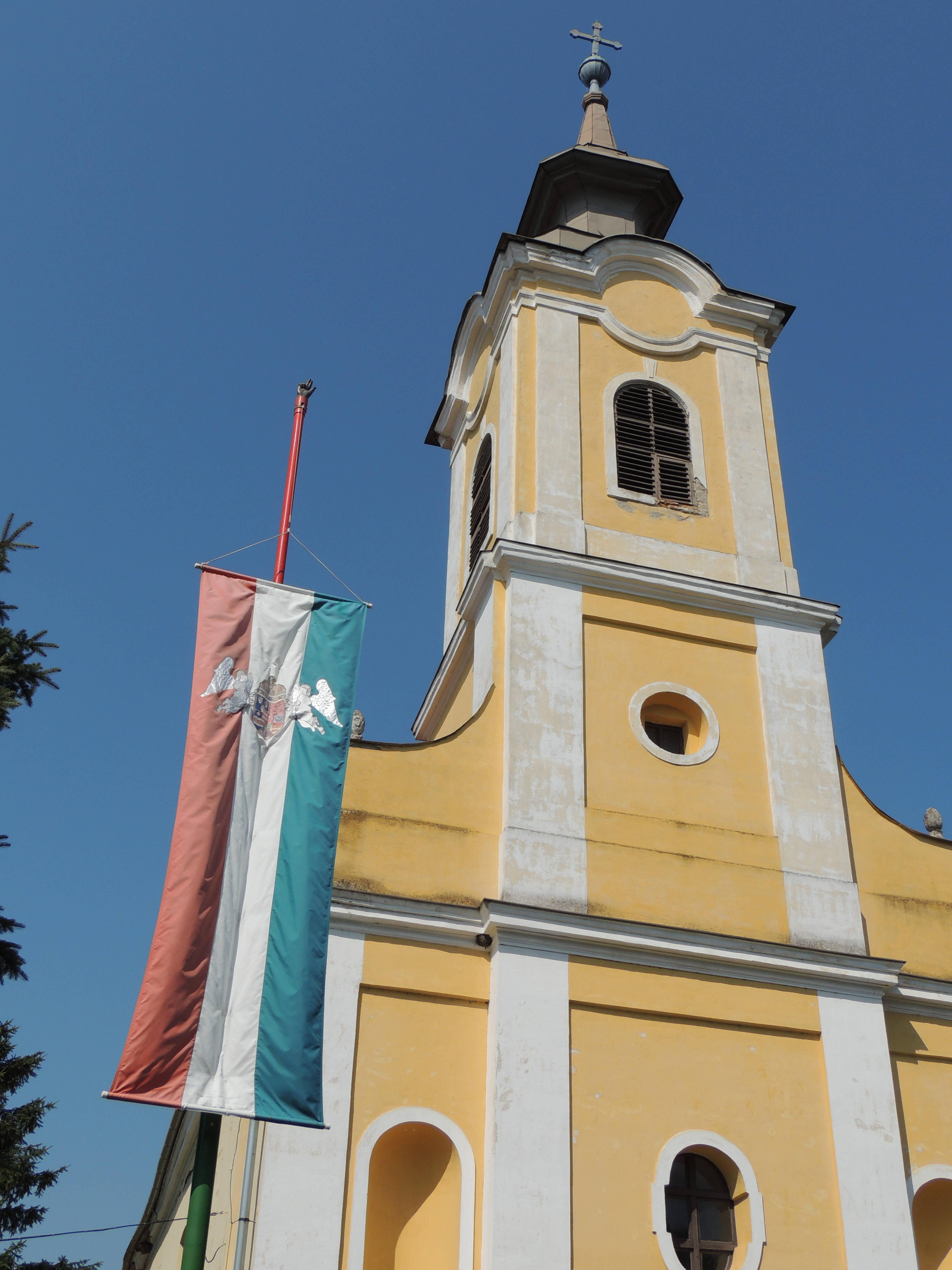 A bárándi római katolikus templom.